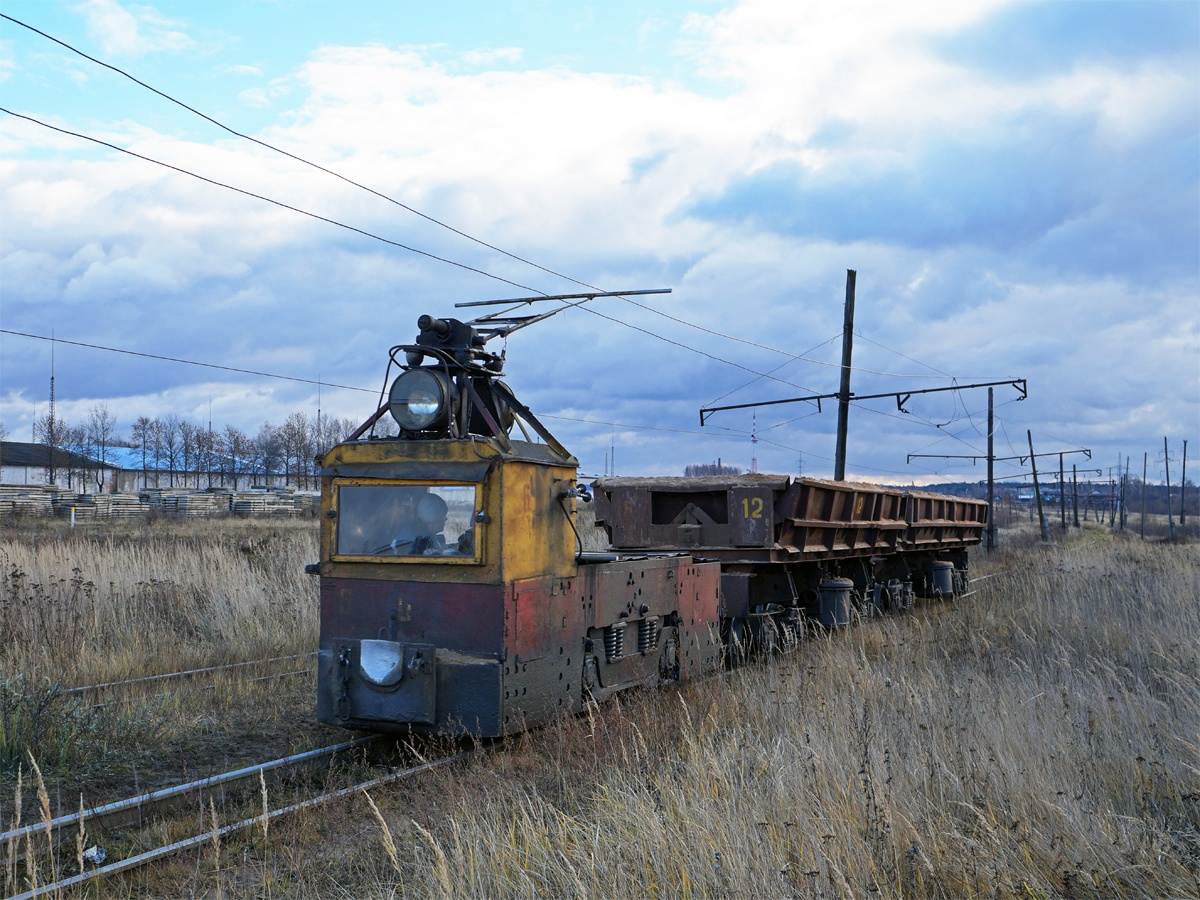 14КР2А №6 с грузовым поездом следует на карьер, УЖД Ивановского силикатного завода